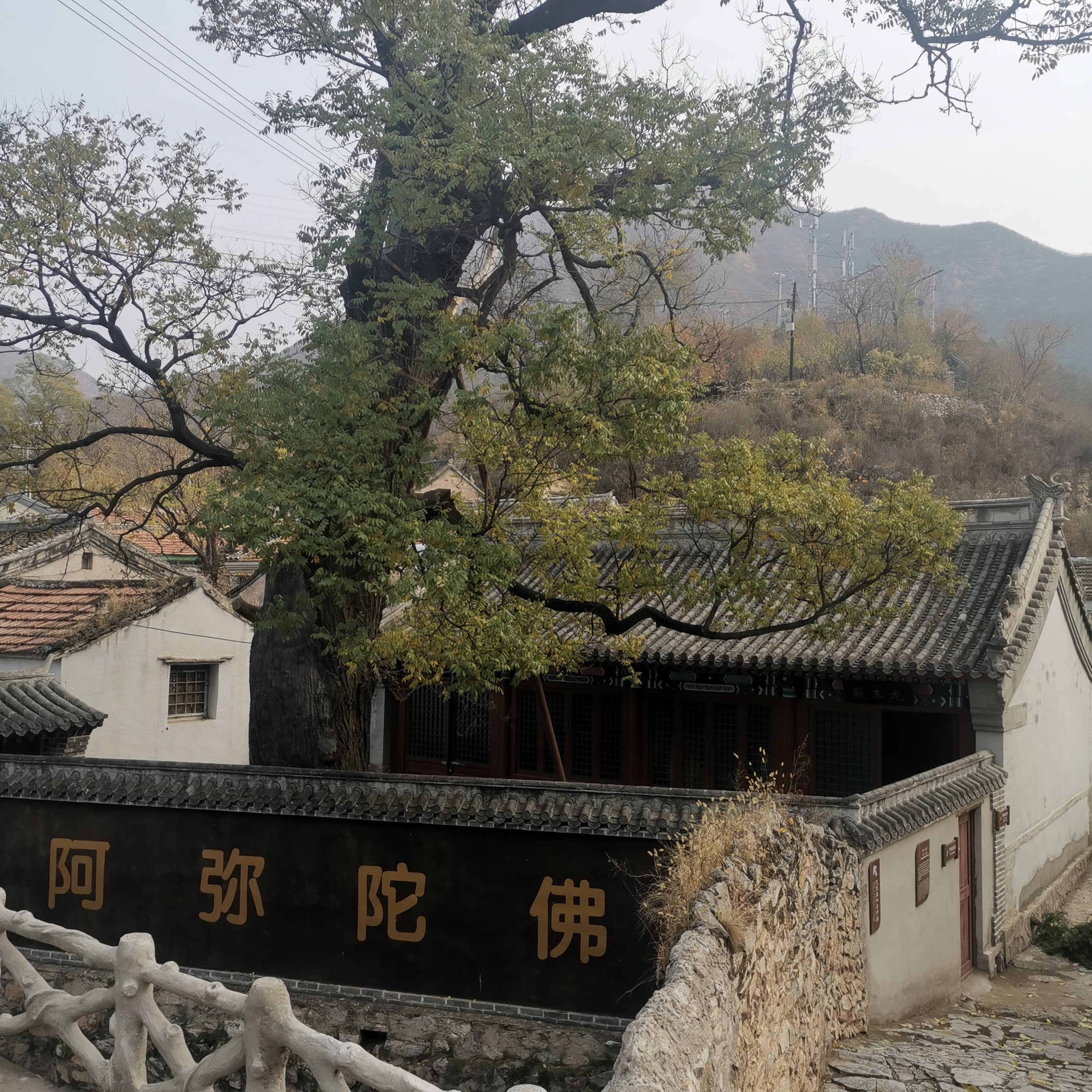 中文（中国大陆）: 苇子水村